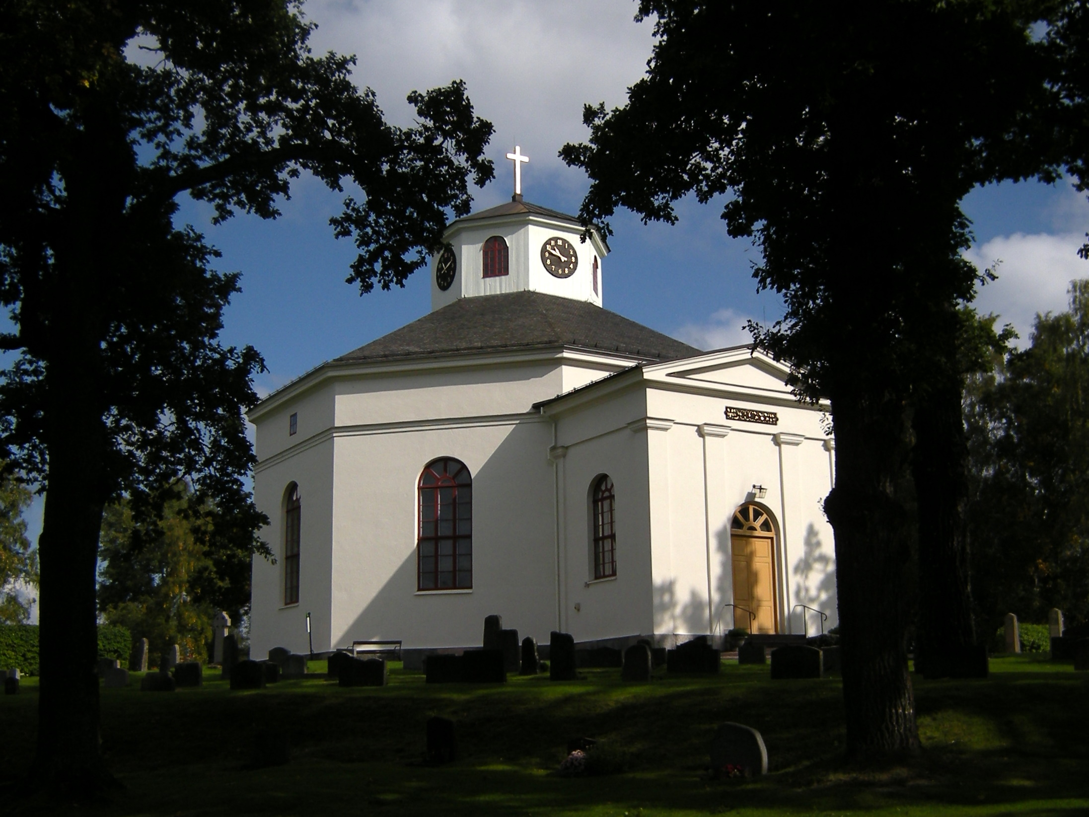 Silvbergs kyrka.